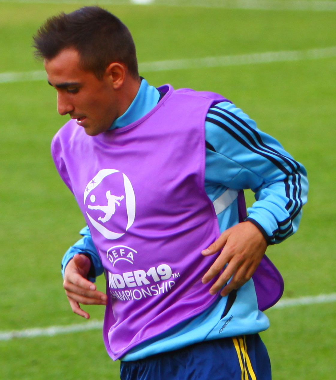 U-19 Portugal vs Spain.